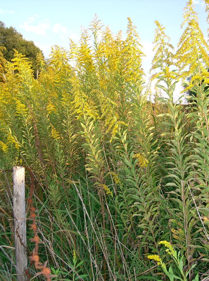 Solidago altissima